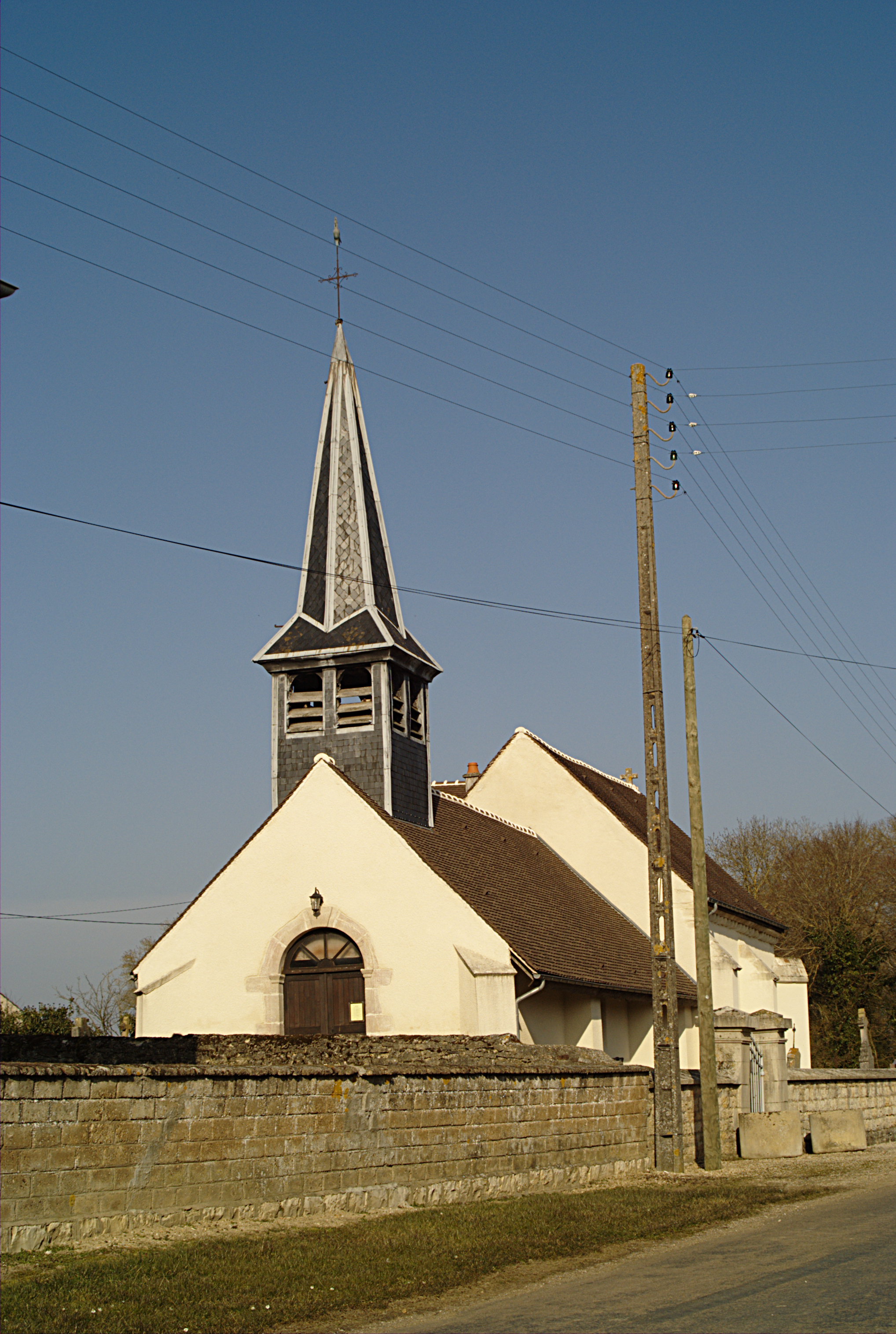 Église paroissiale de la Nativité de la Vierge, Bousselange (Côte d'Or, Bourgogne, France)